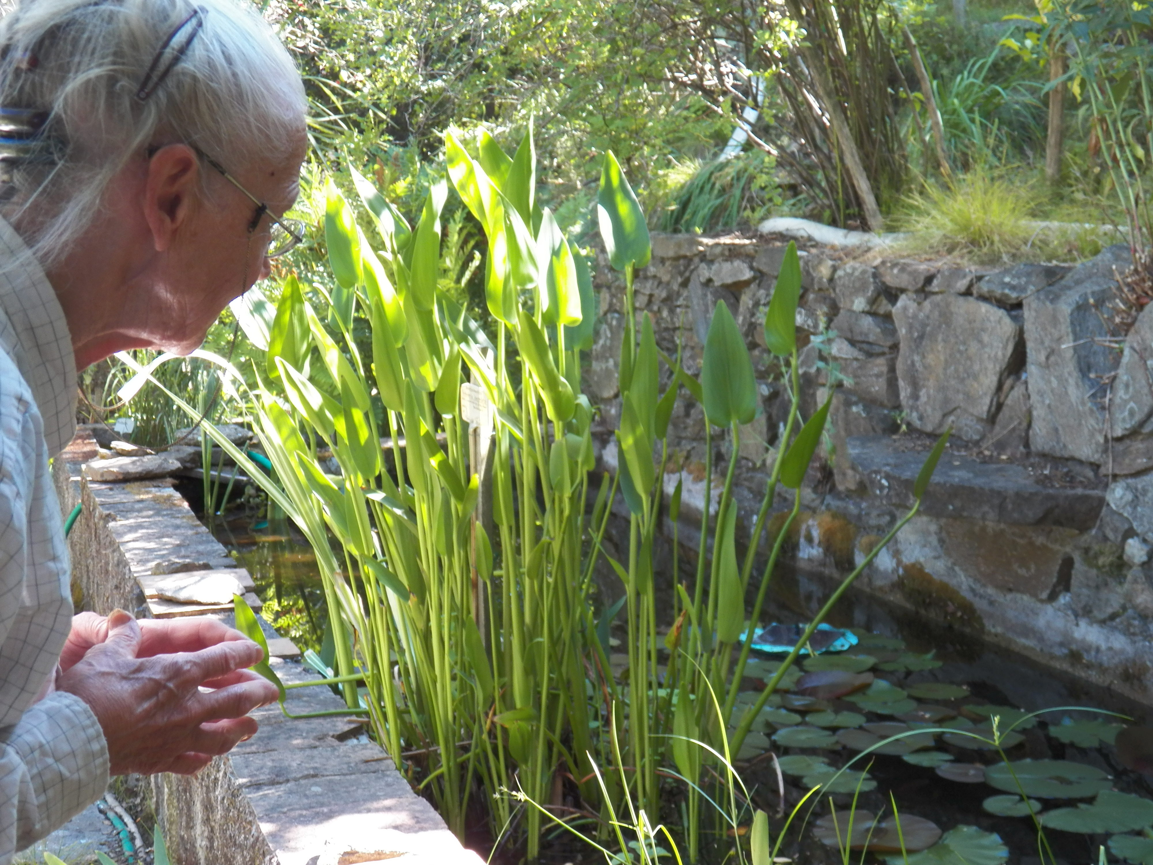 Mme L'Hardy-Halos au coeur du jardin L'Hardy-Denonain